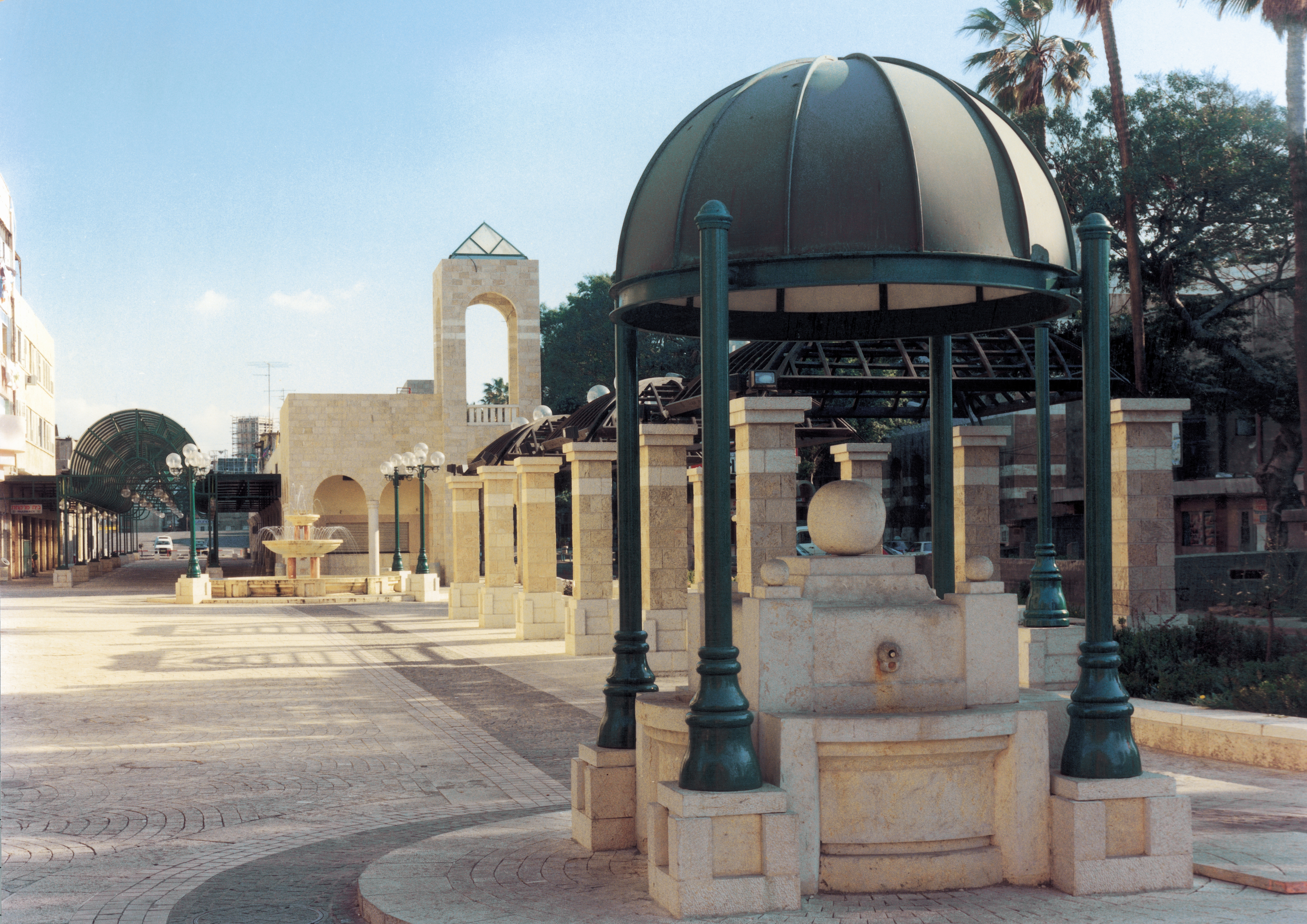 מתחם נגה בשדרות ירושלים, יפו